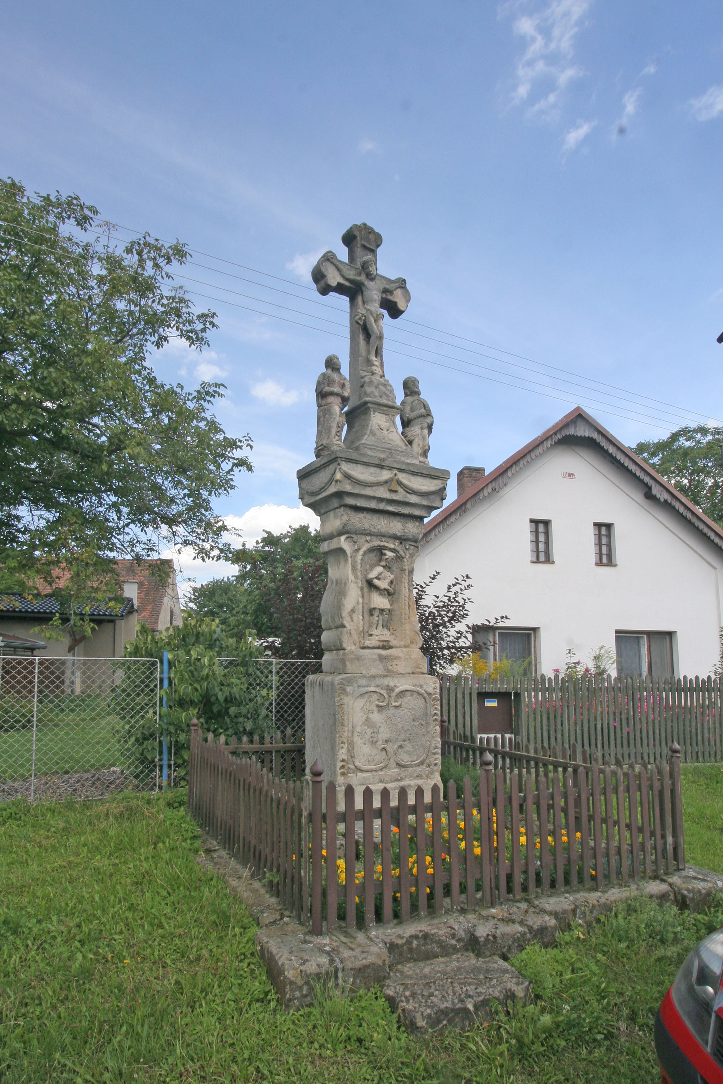 Licomělice kříž